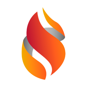 Logo Oficial do INTERFATEC desde 2014